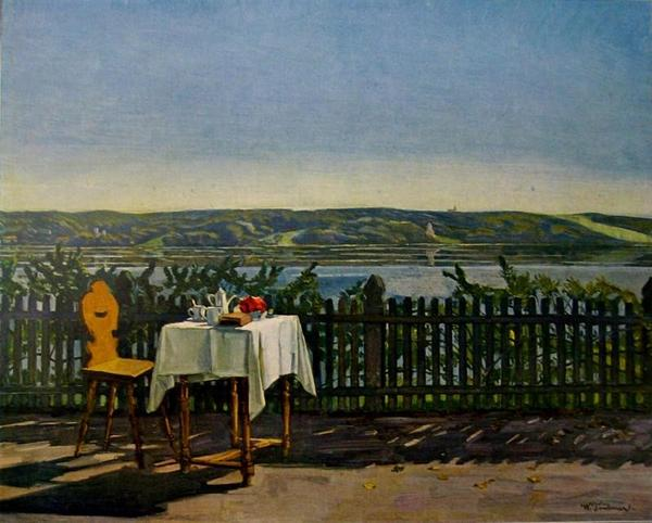 Kaffeetisch am Starnberger Seetitle QS:P1476,de:"Kaffeetisch am Starnberger See" label QS:Lde,"Kaffeetisch am Starnberger See"